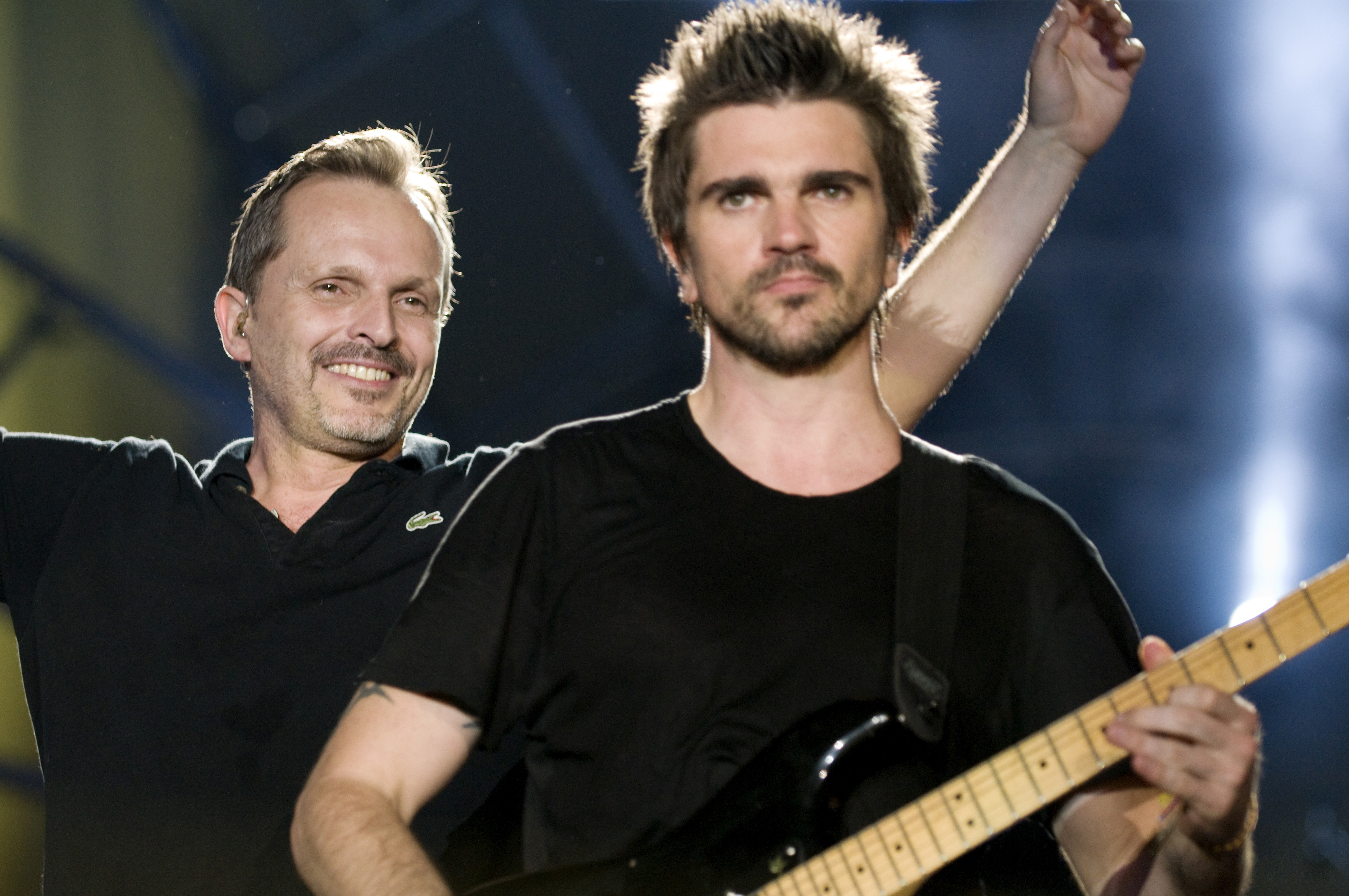 Juanes